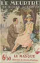 Couverture de l'édition française du roman d'Agatha Christie, "Le Meurtre de Roger Ackroyd" par la Librairie des Champs-Élysées dans la collection "Le Masque", Paris, 1927.